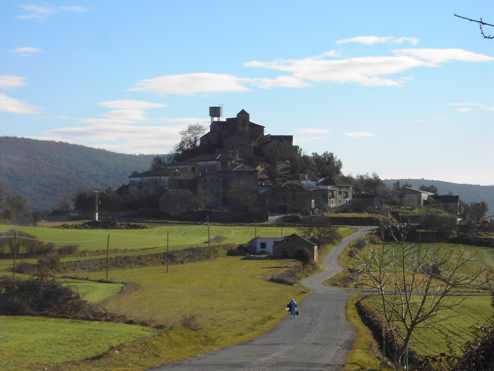 Latorrecilla, en el antiguo municipio de Alto Sobrarbe, actualmente perteneciente a l'Aínsa-Sobrarbe.